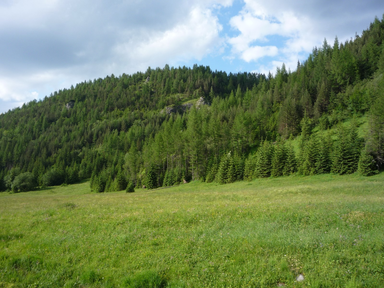 Boczań widoczny z Doliny Jaworzynki